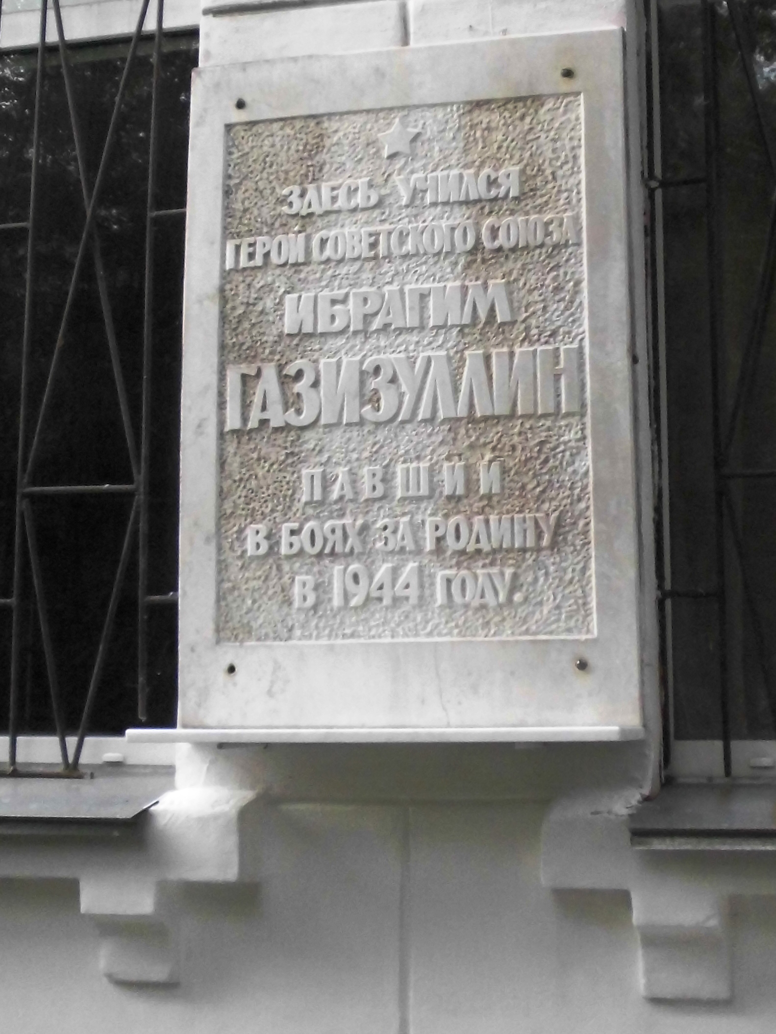 Челябинский государственный институт культуры: улица Орджоникидзе, 36-а, Челябинск, Челябинская область. Учебный корпус № 2 (Институт дополнительного профессионального образования).